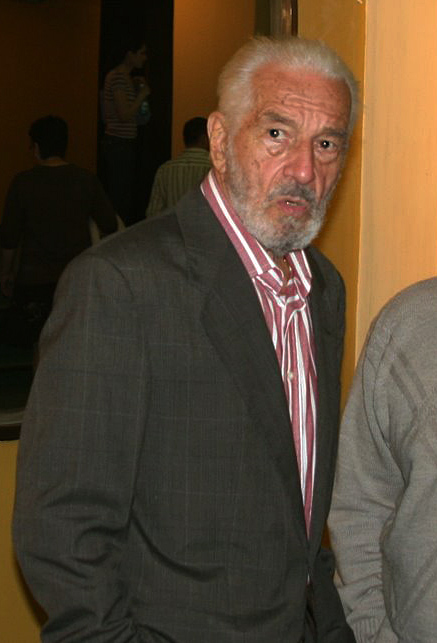 Sergiu Nicolaescu, in foaierul Teatrului de Comedie, inainte de spectacol.